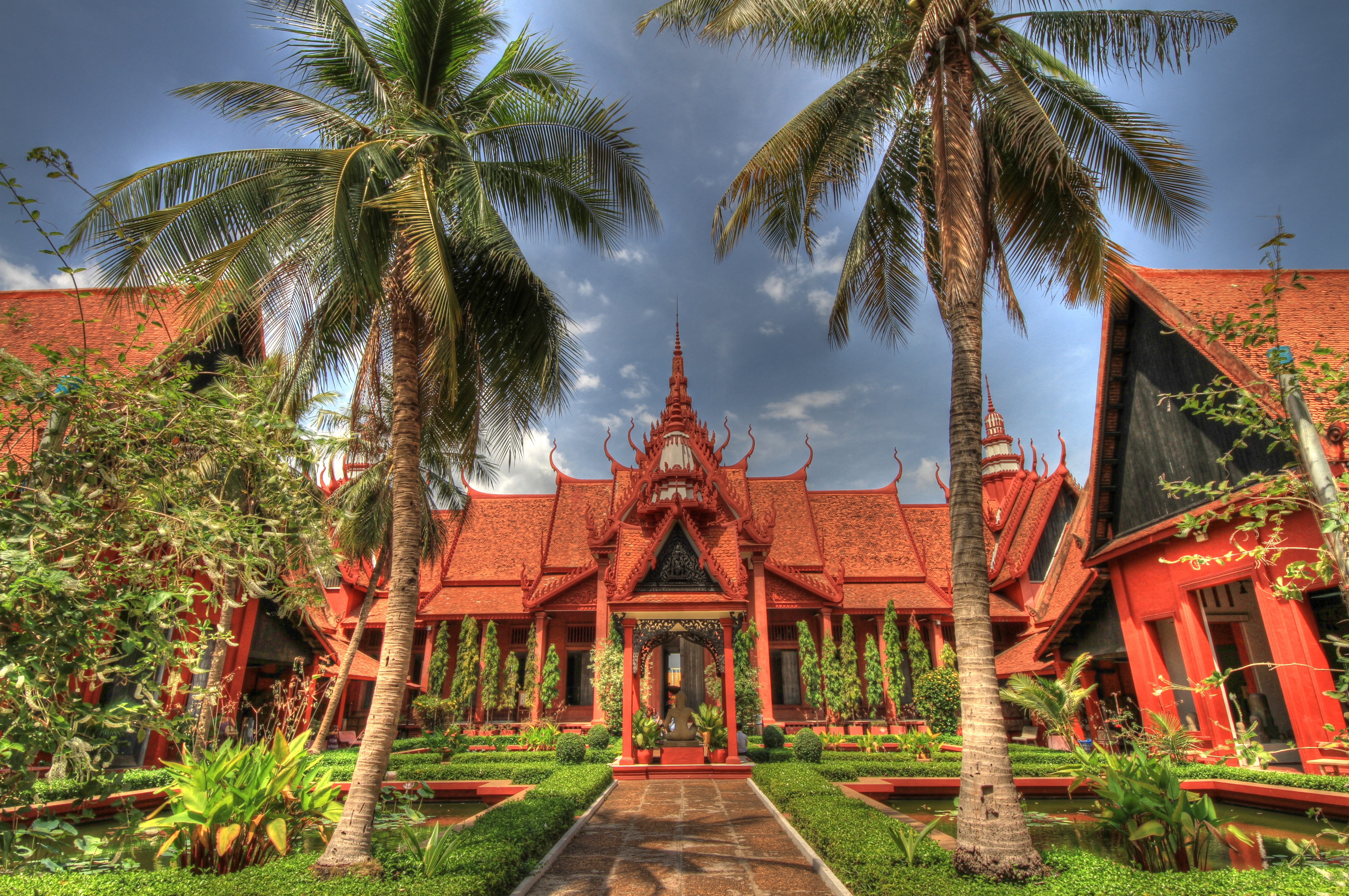 Sangkat Chey Chumneah, Phnom Penh 12206, Cambodia